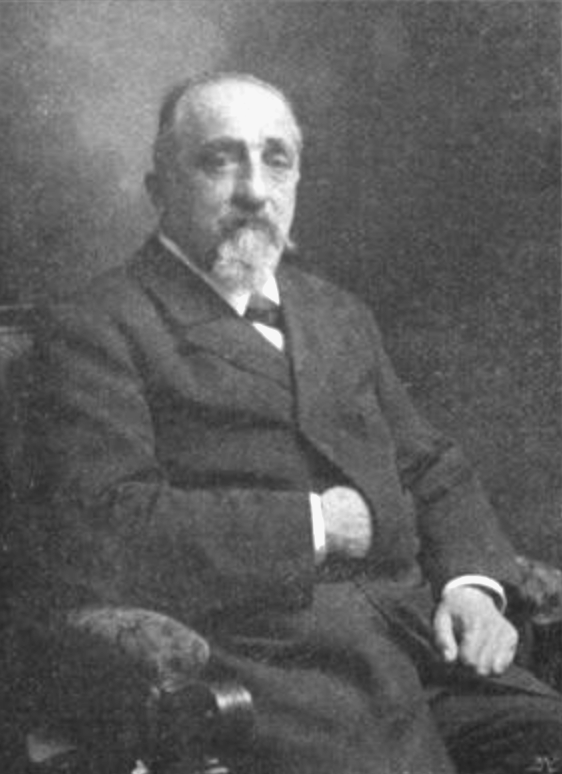 Kinderarzt und Ordinarius in der Allgemeinen Poliklinik Wien